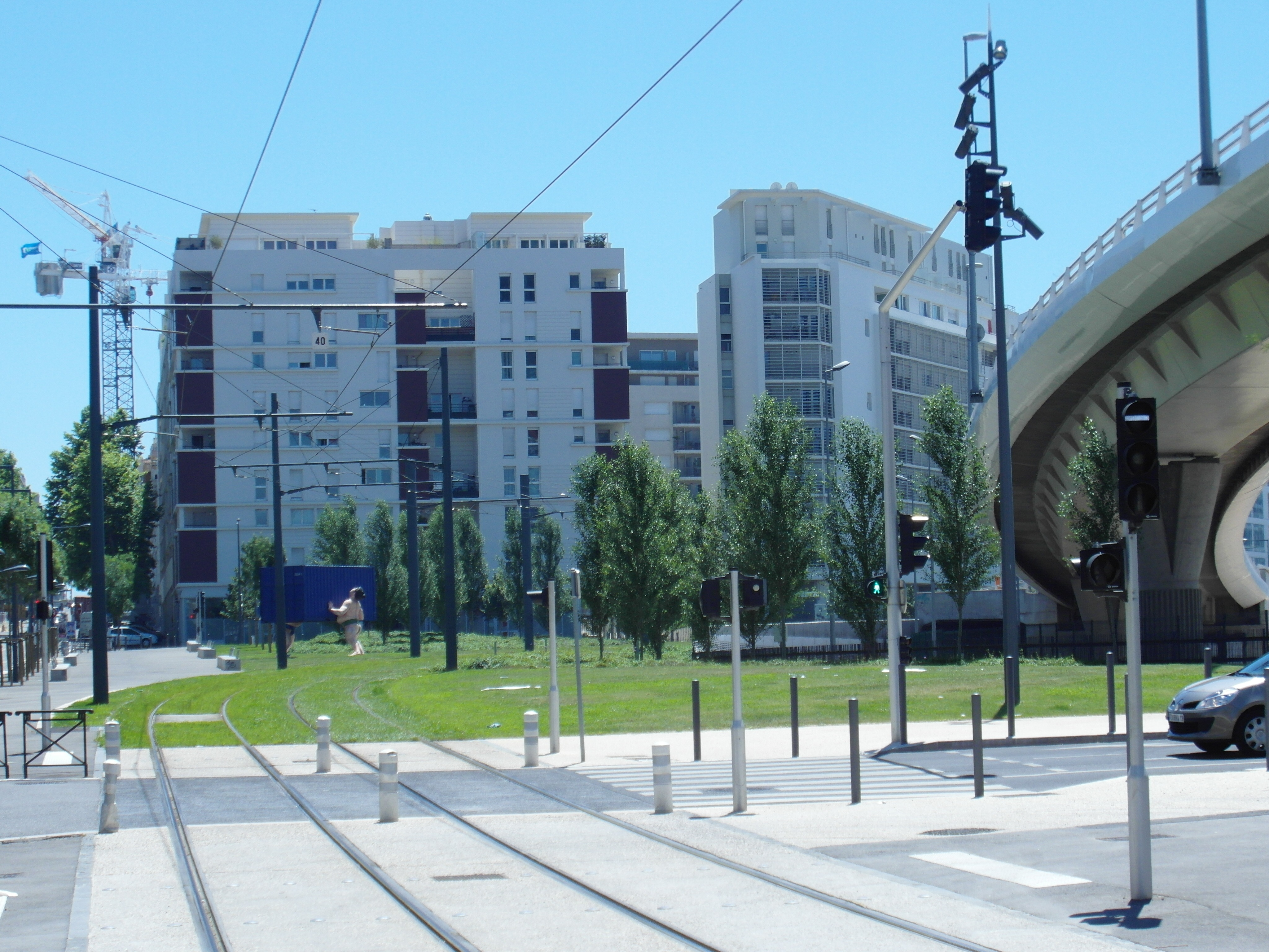 Nordast der Linie T2